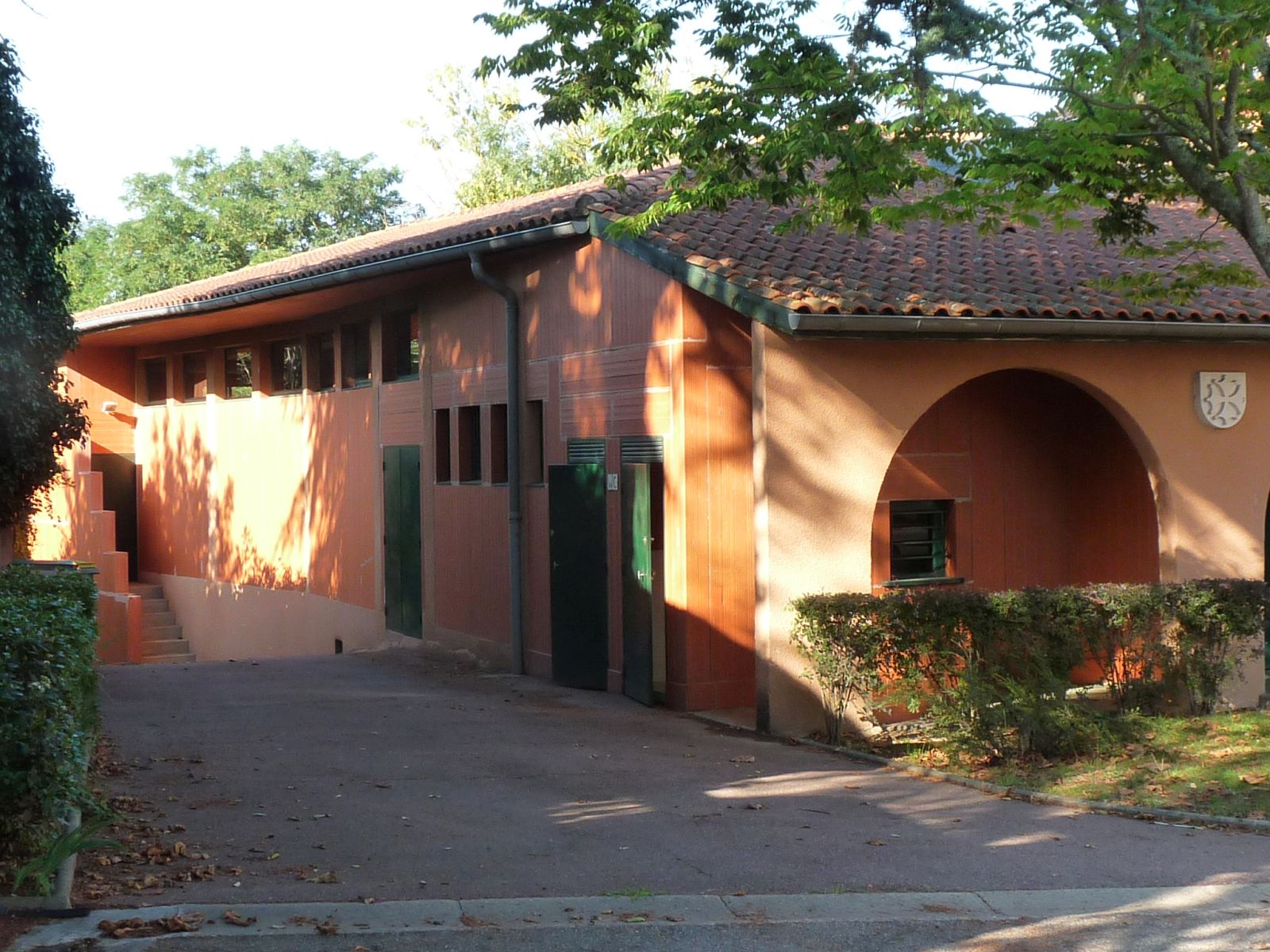 Salle des fêtes, Auragne, Haute-Garonne, France